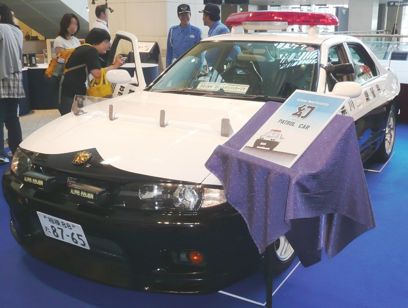 Nissan Skyline GT-R 4door version.